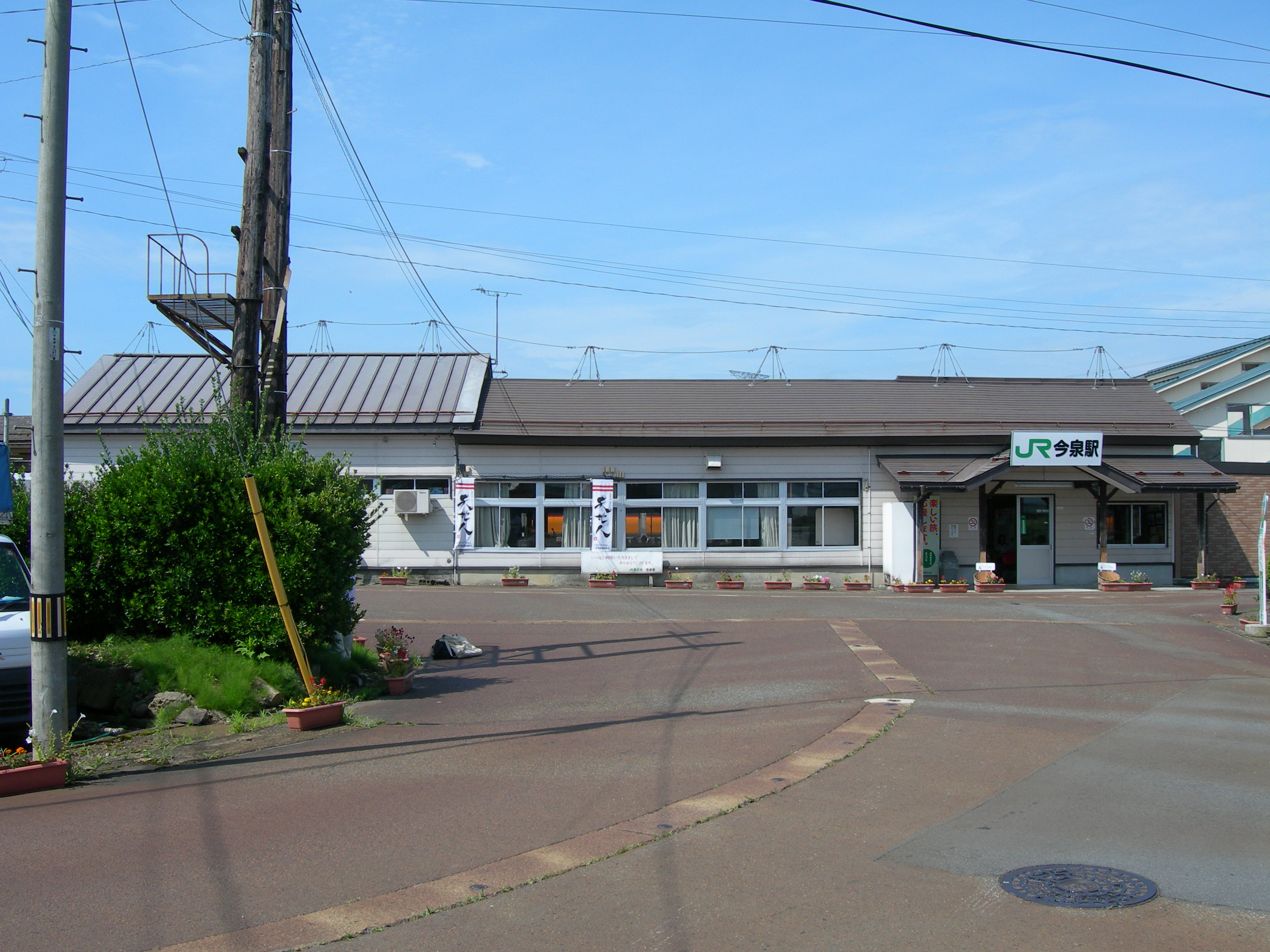 今泉駅